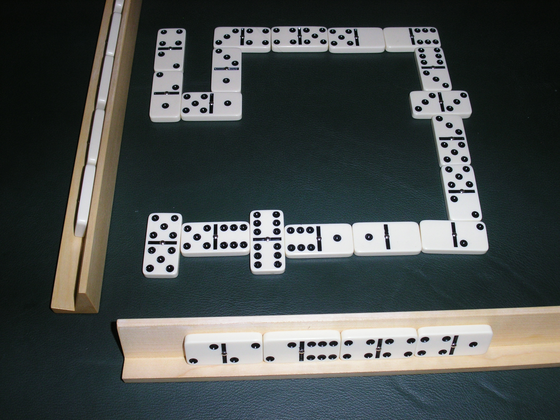 Dominosteine mit Leisten